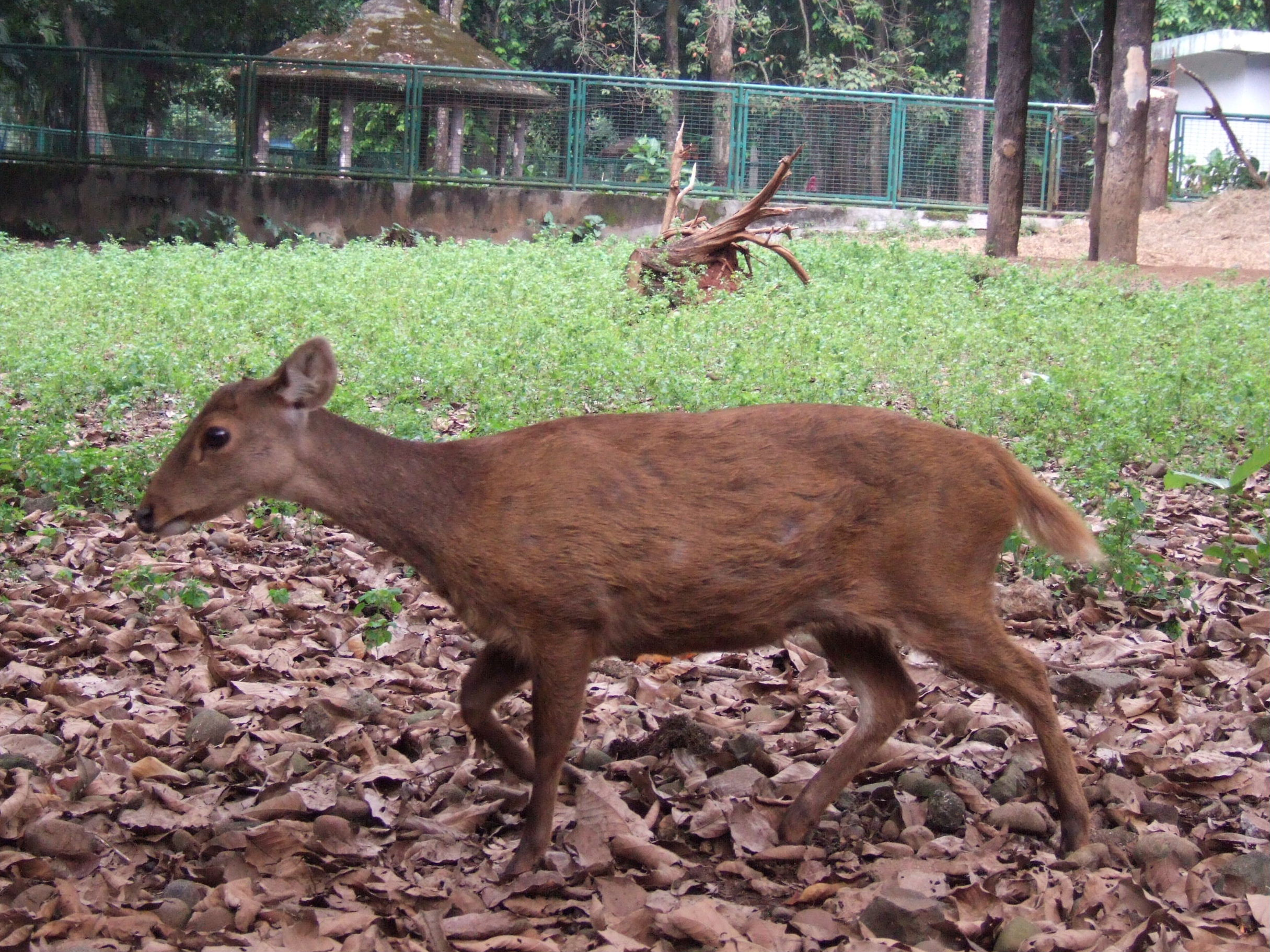 Bawean deer (Axis kuhlii), picture taken at Ragunan Zoo, Jakarta, Indonesia